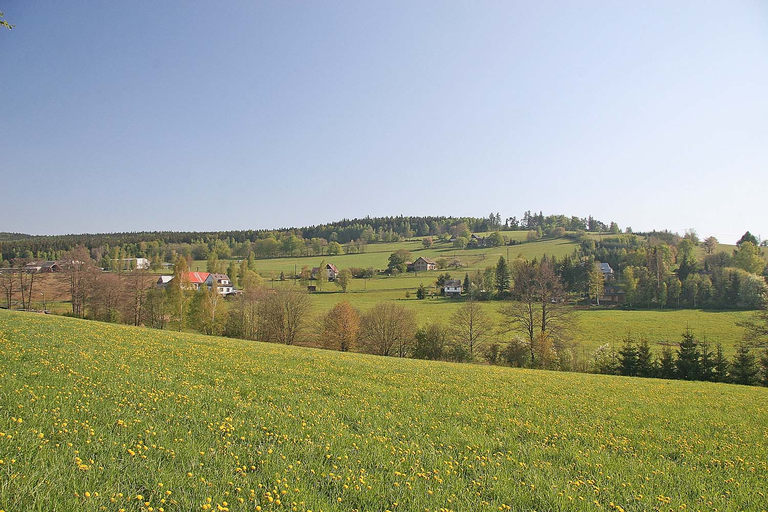 Březiny - pohled od hřbitova na východ